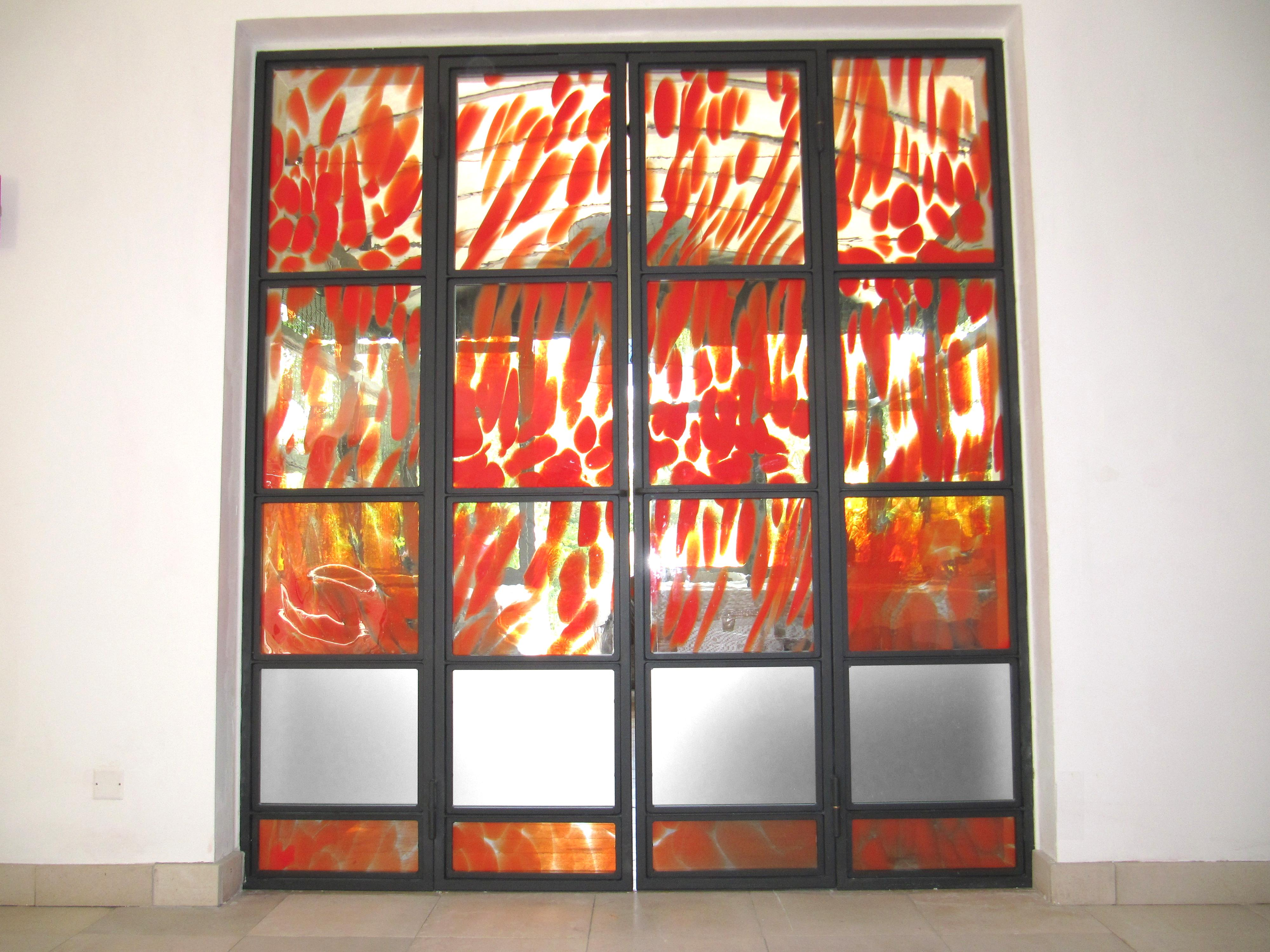 Une création de Carlo Roccella.